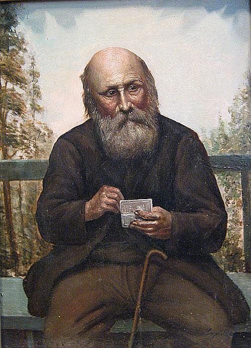 Rustend op de bank